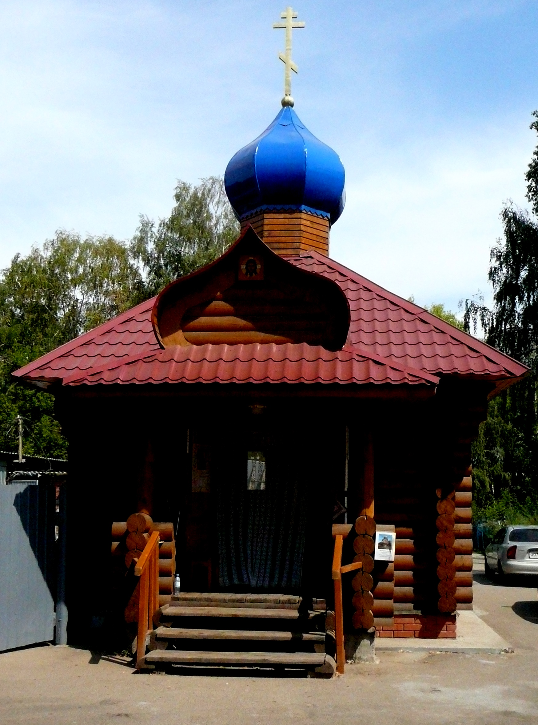 Часовня в честь Архистратига Михаила на Архангельском кладбище в городе Казани.